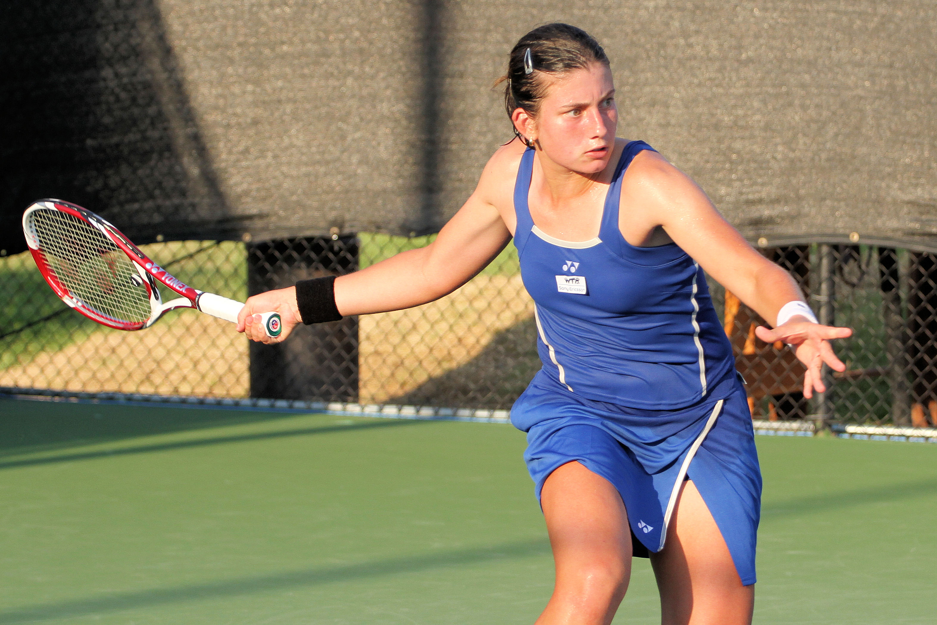 Anastasija Sevastova (LAT) 2011-08-25 Begu def Sevastova